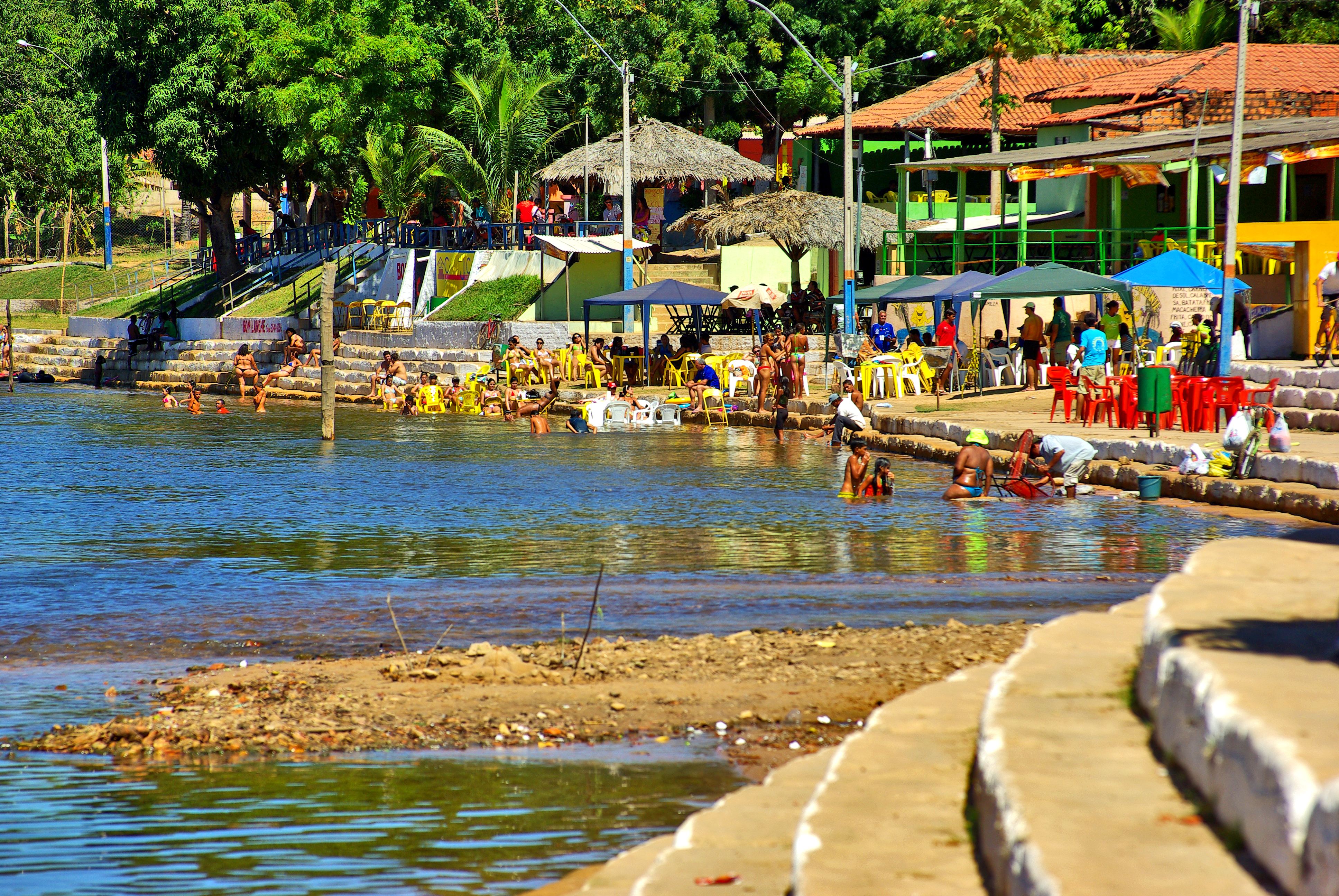 Beira-Rio Balsas